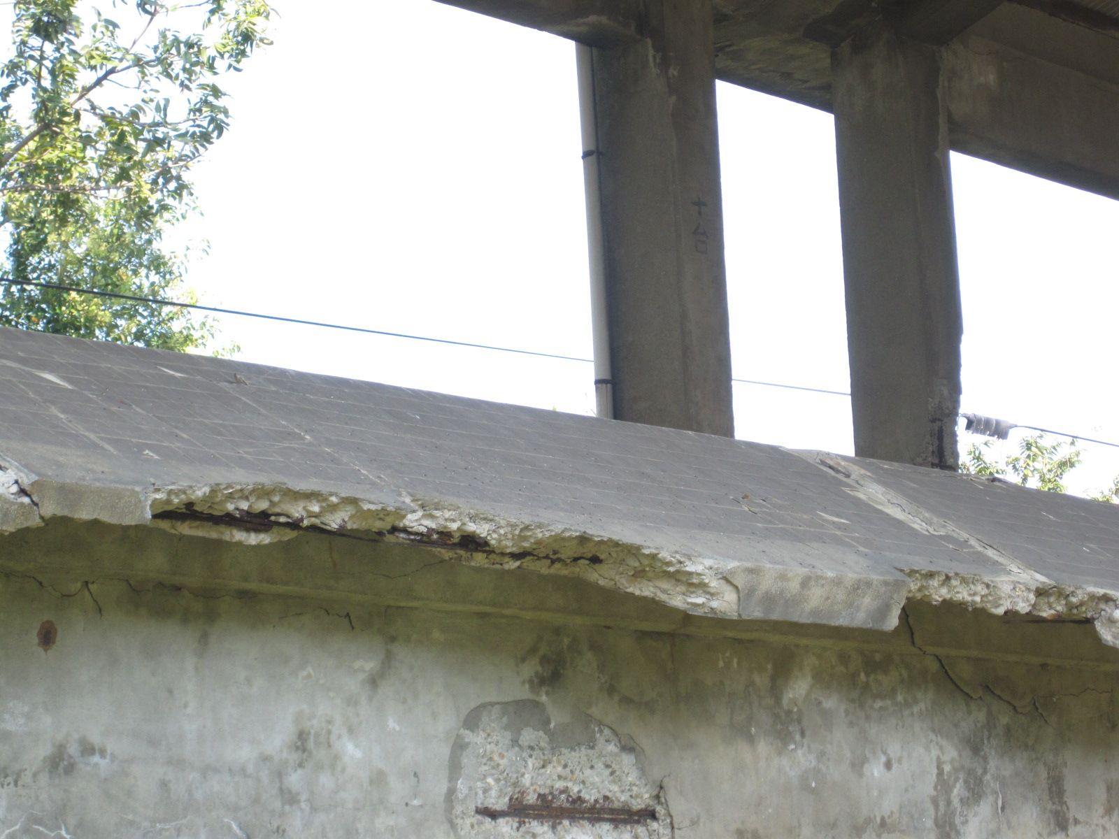 東太子宮鹽運聯合轉運臺的卸鹽斜板